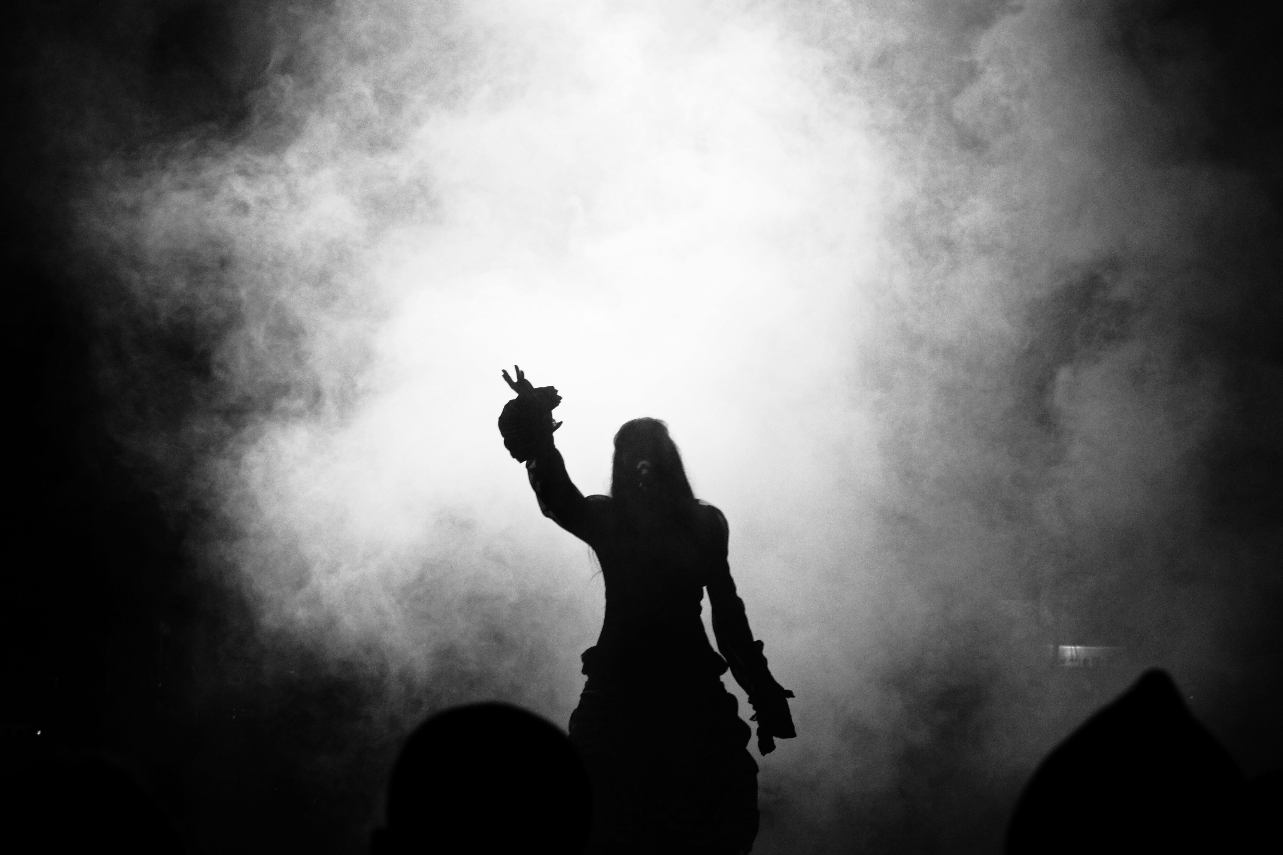 Closterkeller na koncercie w Wesołej podczas festiwalu Rock On, 2011-09-03